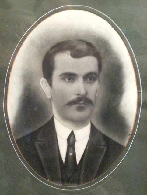 Ludovico Sartori, filho de Salvador Sartori e Angela Zancaner.